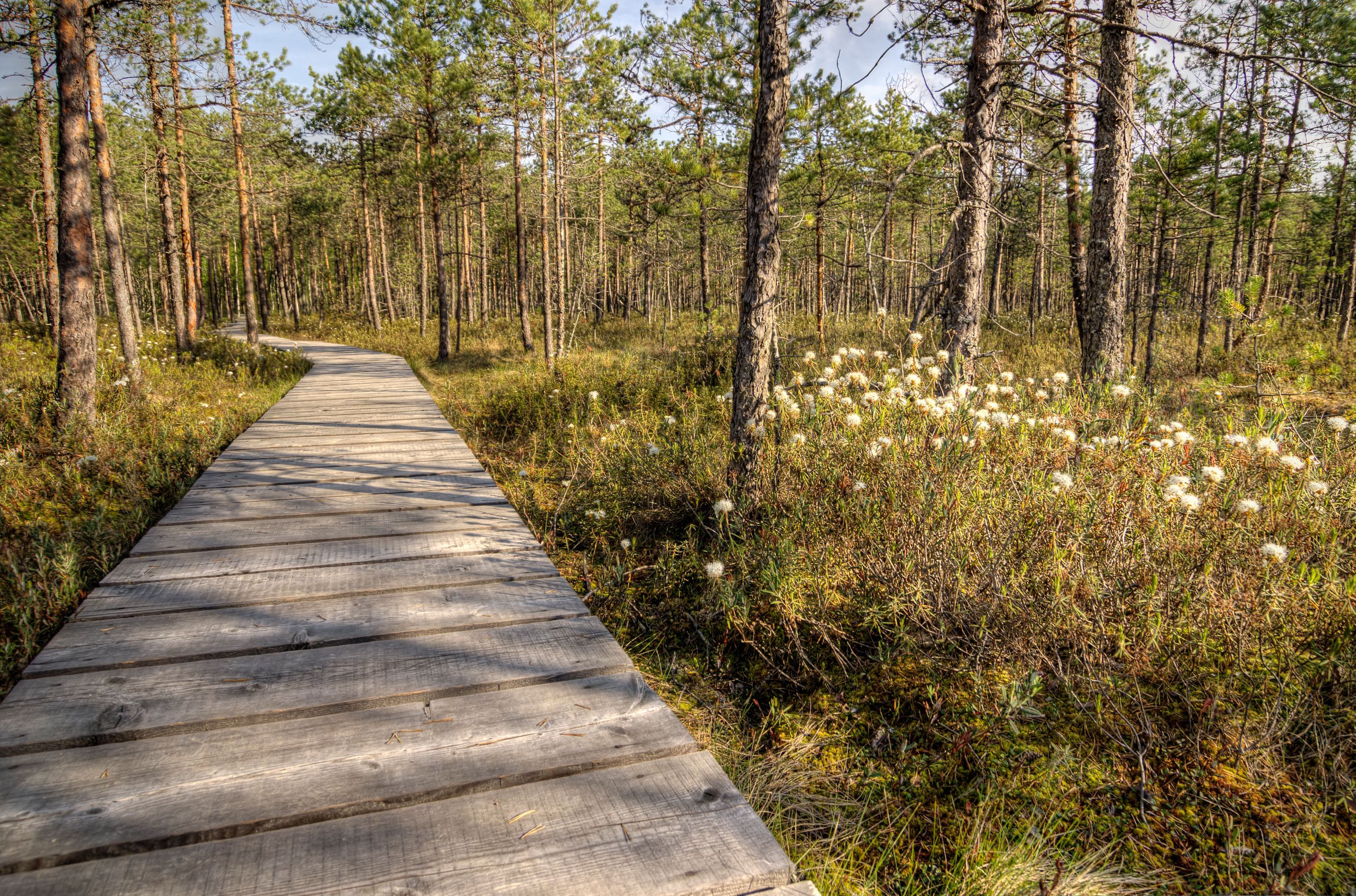 Valgesoo raba matkarada